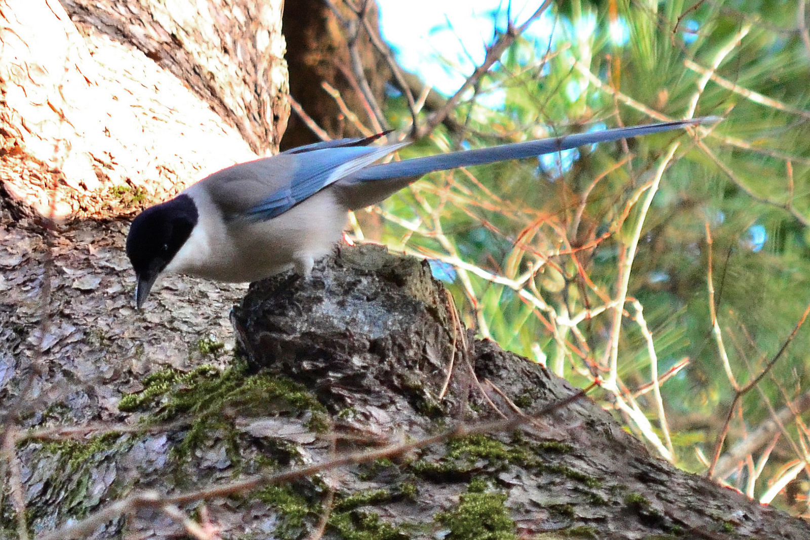 オナガ Azure-winged Magpie Cyanopica cyanus, Fujigaoka 2 Chome, Yokohama-shi, Kanagawa Prefecture, Japan.